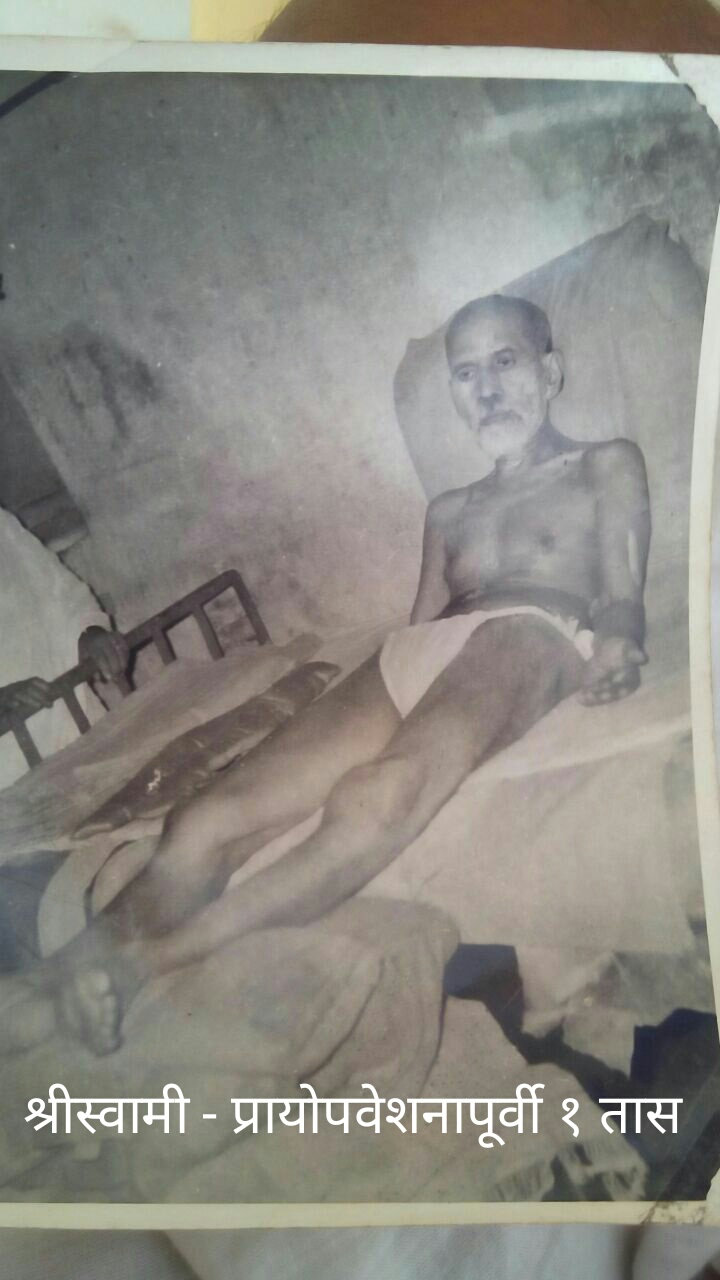 परमहंस परिव्राजकाचार्य श्रीप्रज्ञानानंद सरस्वती स्वामींची प्रायोपवेशनाने समाधी घेण्याच्या १ तासापूर्वीची भावमुद्रा